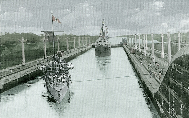 BAP Teniente Rodrigez en 1914